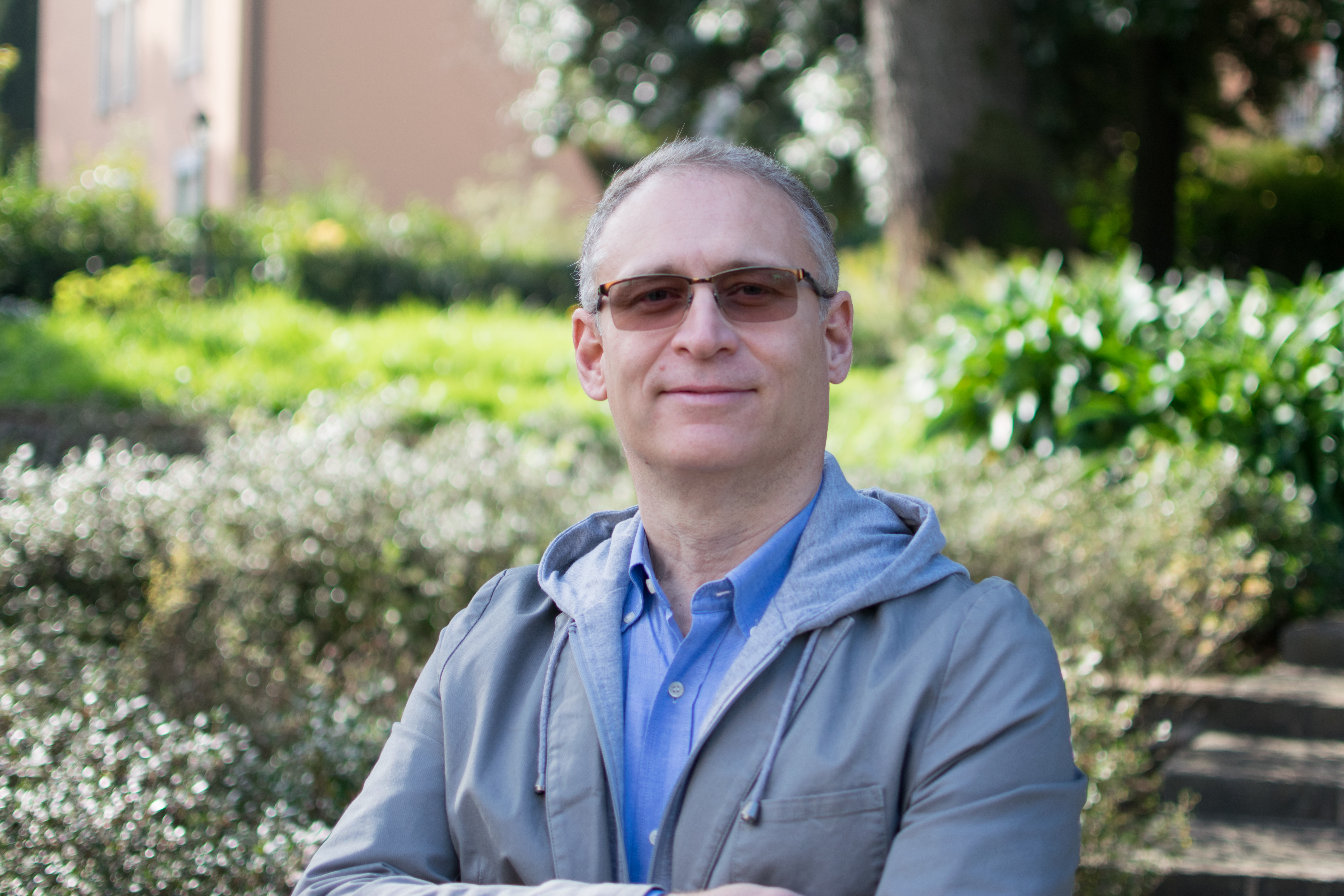 Fotografia di Fabio Fracas, autore del saggio divulgativo "Il mondo secondo la Fisica Quantistica" pubblicato da Sperling & Kupfer.